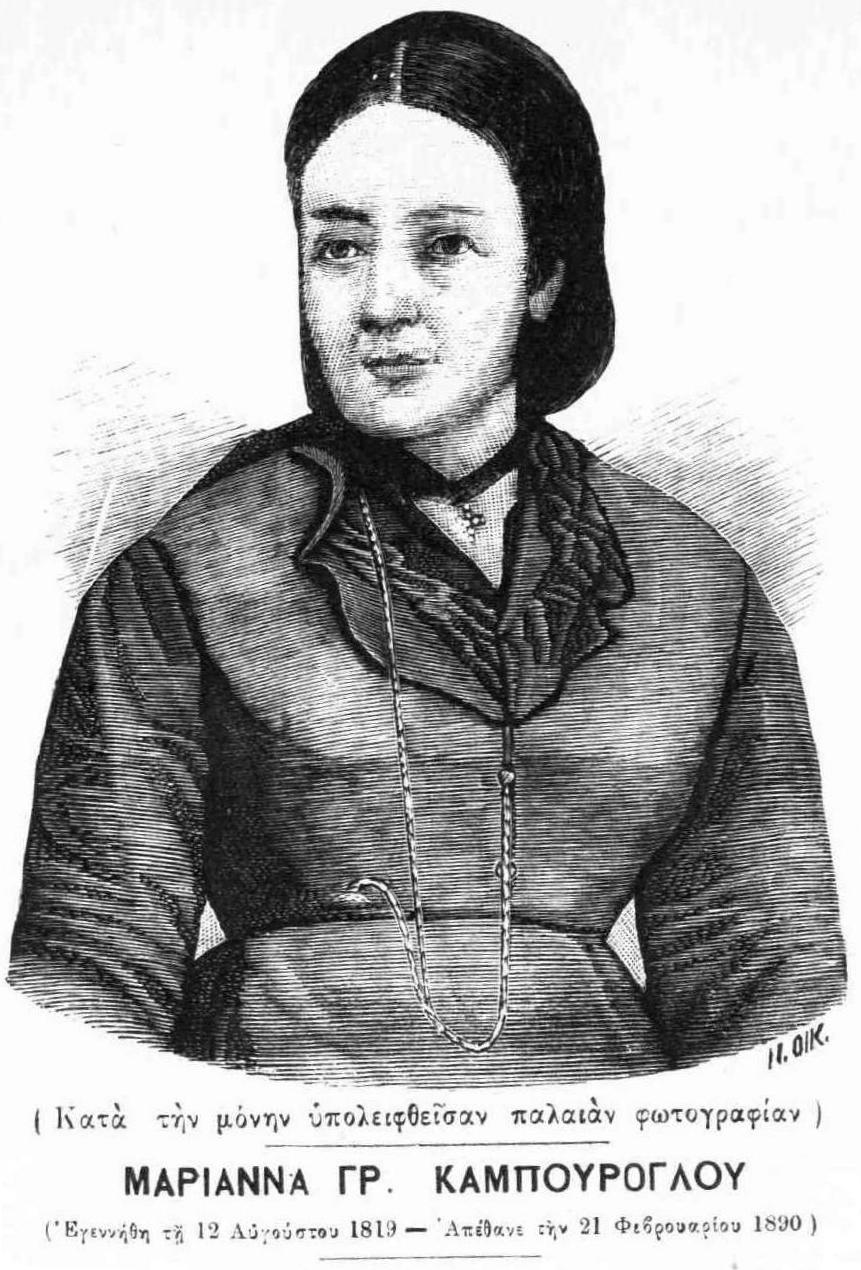 Griechische Persönlichkeit 19. Jahrhundert